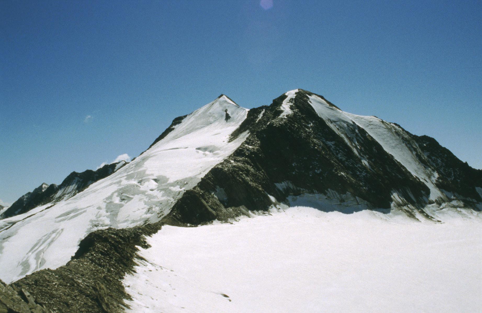 Schalfkogel von Norden, vom Firmisanjoch